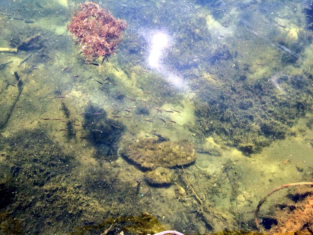 Озеро Увильды: Памятник природы расположен в области предгорий восточного склона Уральских гор в пределах границ Аргаяшского муниципального района, Карабашского и Кыштымского городских округов, Аргаяшский район, Челябинская область This image is related to the protected area of Russia number 7410018